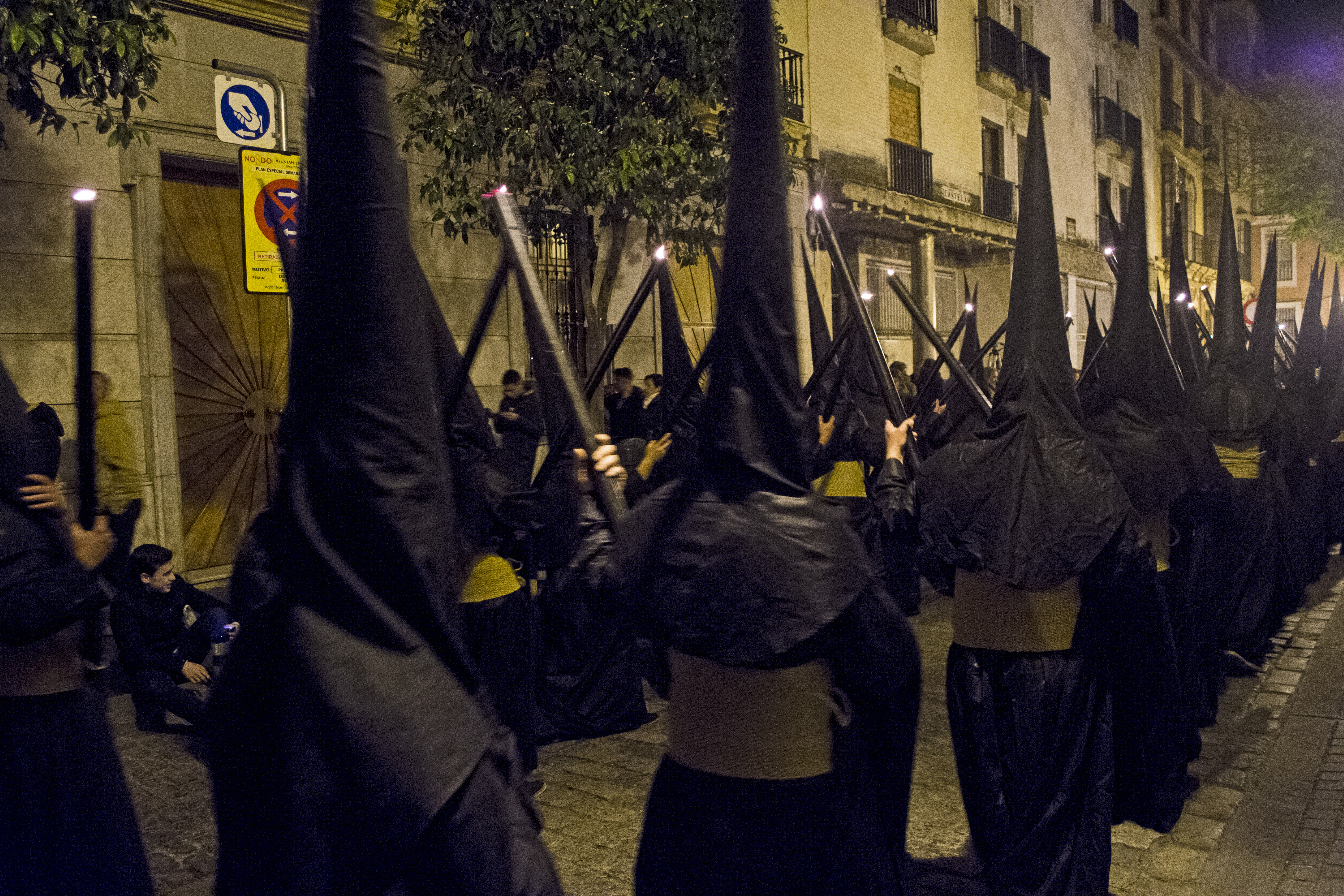 Nazarenos de la cofradía del Calvario, Sevilla.